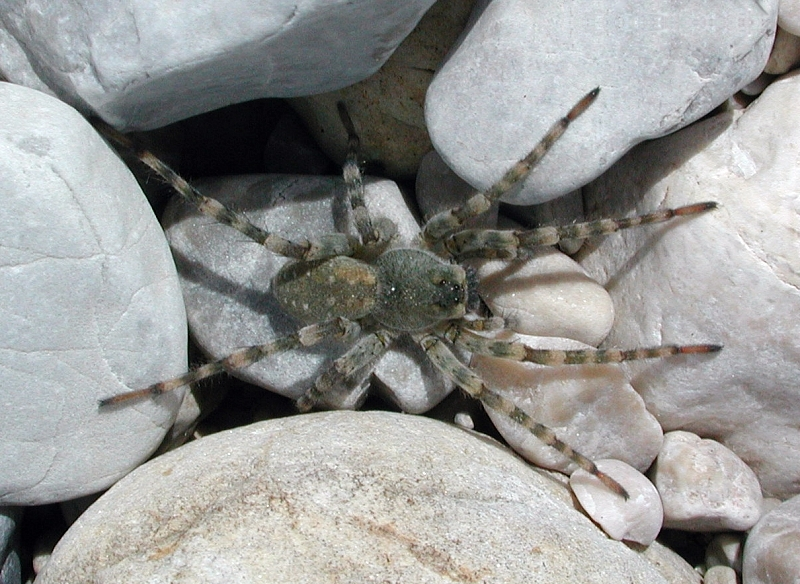 Arctosa cinerea, Isar-Aue, Garmisch, Bayern, Deutschland